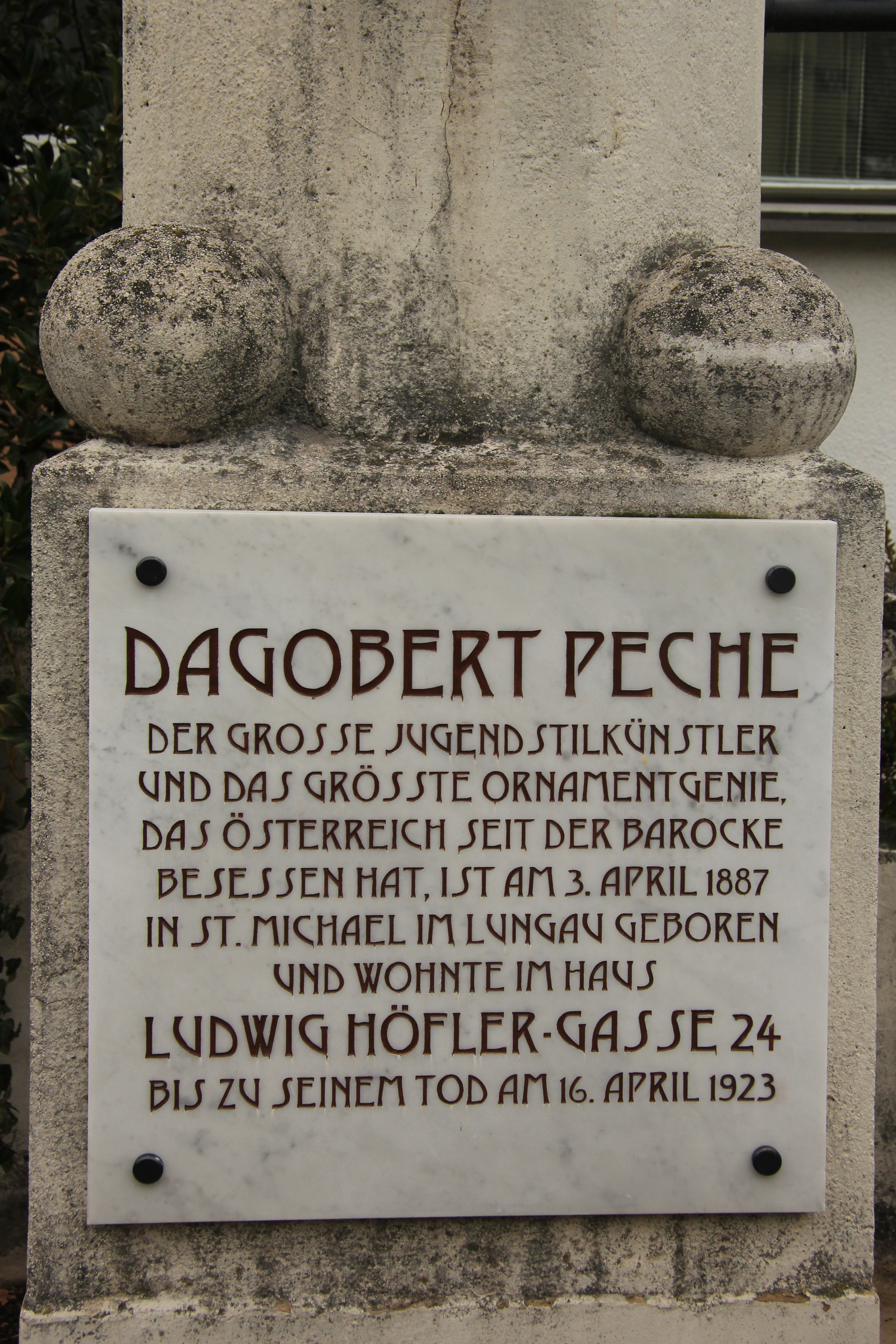 Gedenktafel beim Wohnhaus in Mödling, in dem Dagobert Peche, eine Zeitlang wohnte